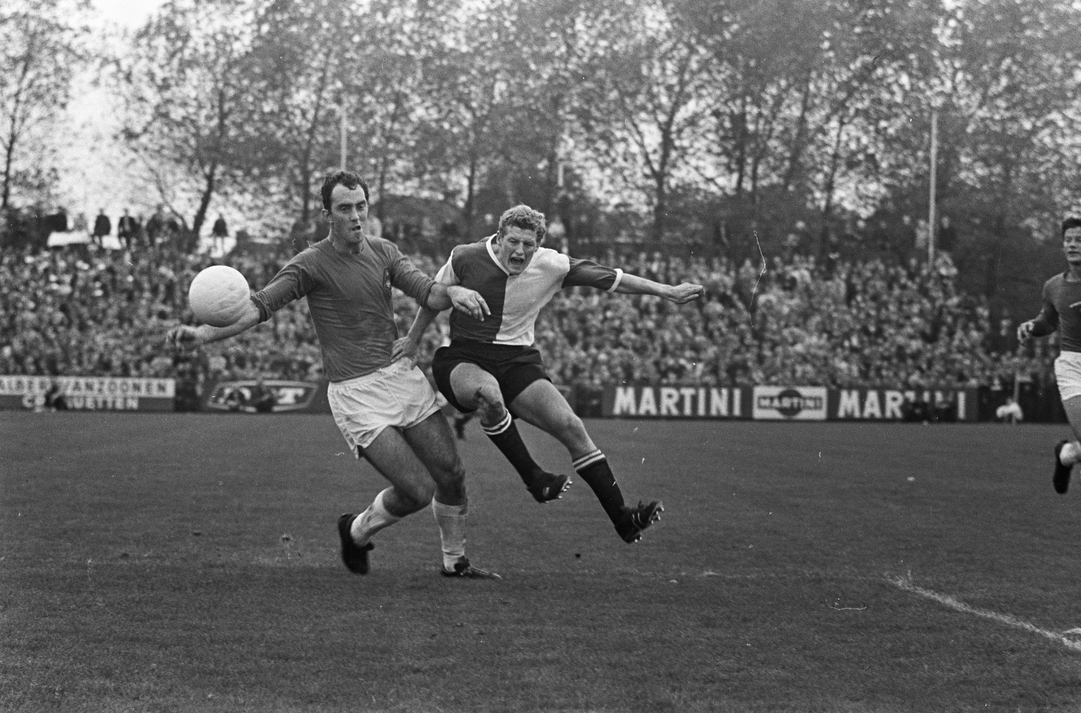 Collectie / Archief : Fotocollectie Anefo Reportage / Serie : [ onbekend ] Beschrijving : Telstar tegen Feyenoord 1-2. Andre (T) schijnt bal met hand te spelen. Wim Jansen is laat Datum : 8 oktober 1967 Trefwoorden : sport, voetbal Persoonsnaam : Andre, Jansen, Wim Instellingsnaam : Feyenoord Fotograaf : Kroon, Ron / Anefo Auteursrechthebbende : Nationaal Archief Materiaalsoort : Negatief (zwart/wit) Nummer archiefinventaris : bekijk toegang 2.24.01.05 Bestanddeelnummer : 920-7652